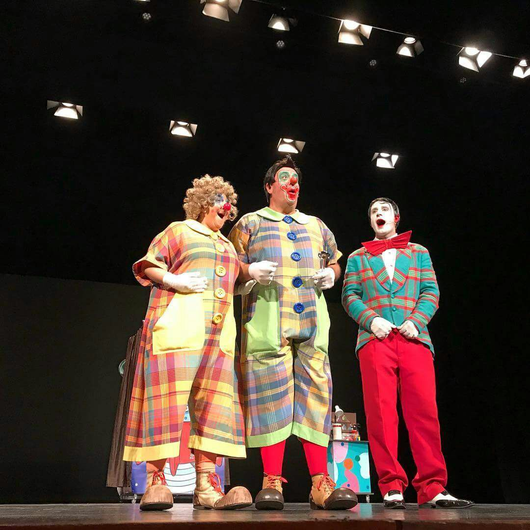 Gaur egungo Txirri, Mirri eta Txiribiton 2018ko urtarrileko saio batean